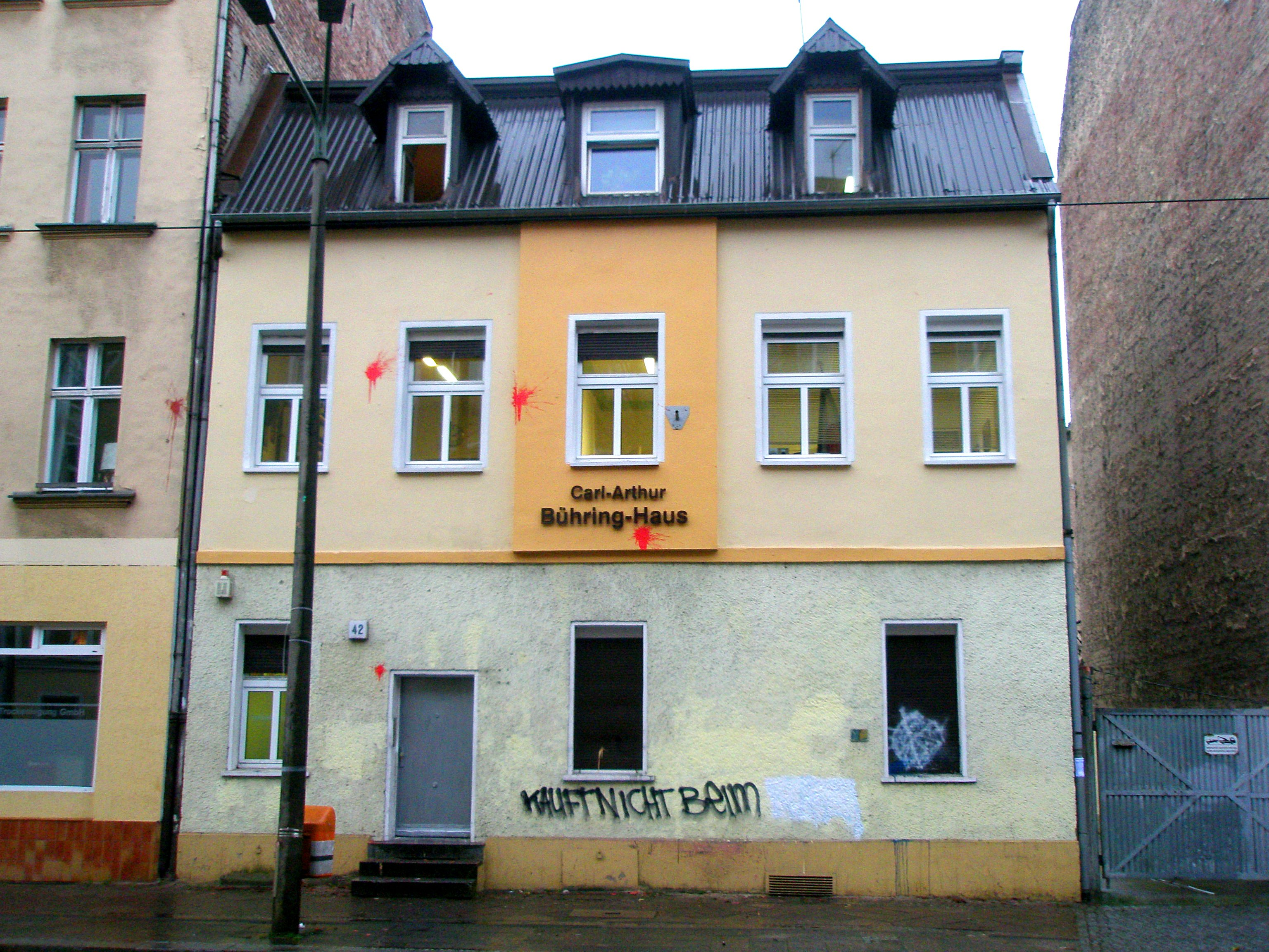 „Kauft nicht beim (Nazi)“ (letztes Wort bereits entfernt), gesprayt an die Bundesgeschäftsstelle/Parteizentrale der NPD (Nationaldemokratische Partei Deutschlands)